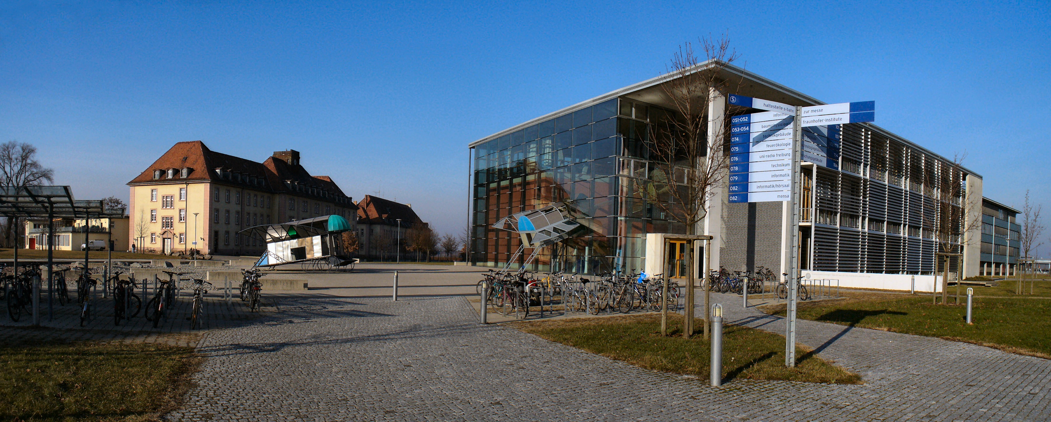 Fakultät für Angewandte Wissenschaften der Universität Freiburg: rechts das Gebäude 101 (Bibliothek, Hörsäle, Seminarräume, Dekanat), in der Mitte zwei Lehrstuhlgebäude, links hinten die Mensa; die Objekte in der Mitte sind Teile der Installation "Jump and Twist" von Dennis Oppenheimer.